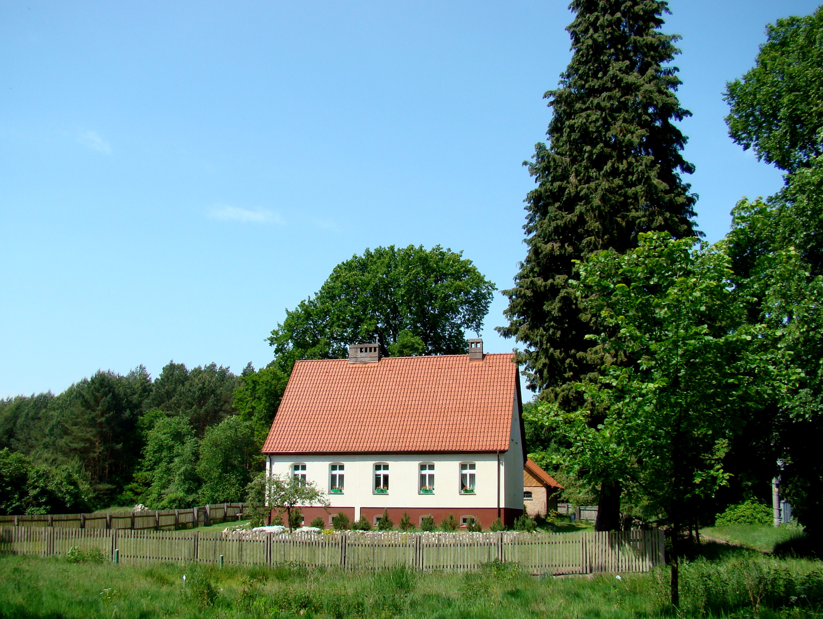 Myślibórz Mały, (Gmina Nowe Warpno, Województwo zachodniopomorskie), Polska